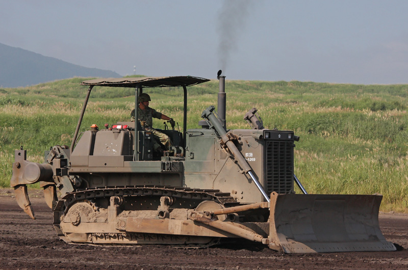 教育支援施設隊の中型ドーザ